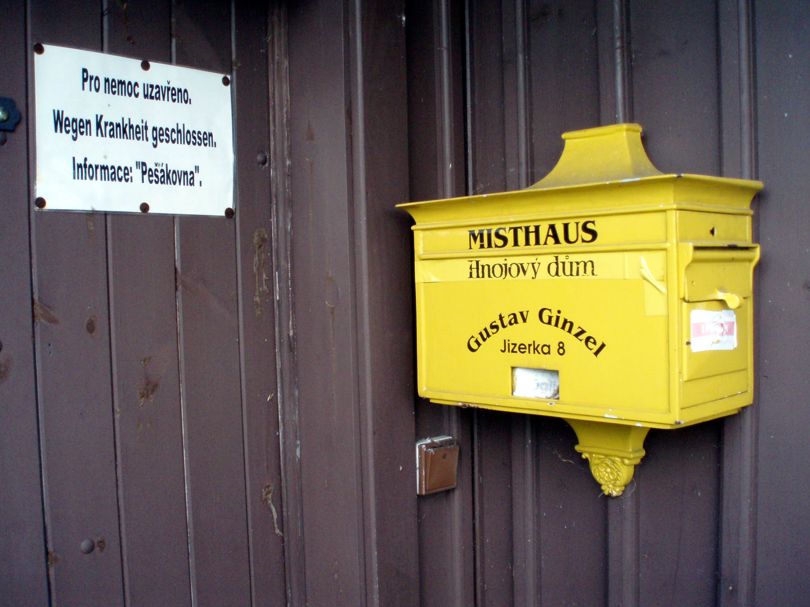 Wegen Krankheit geschlossenes Misthaus